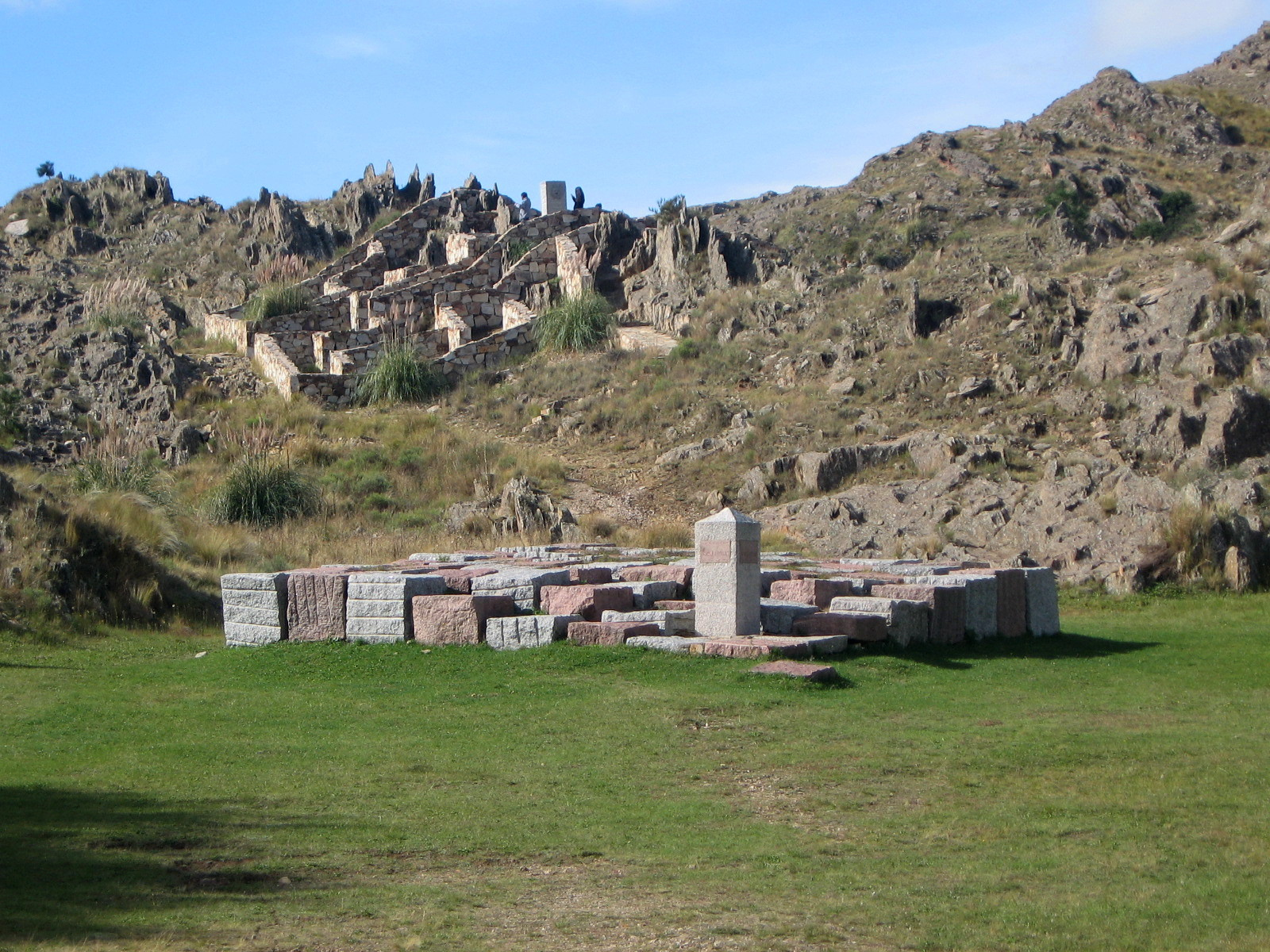 En el lugar se encuentran los restos de Juan Crisóstomo Lafinur, antepasado de Jorge Luis Borges. Las construcciones en piedra representan un tablero de ajedrez y un laberinto.